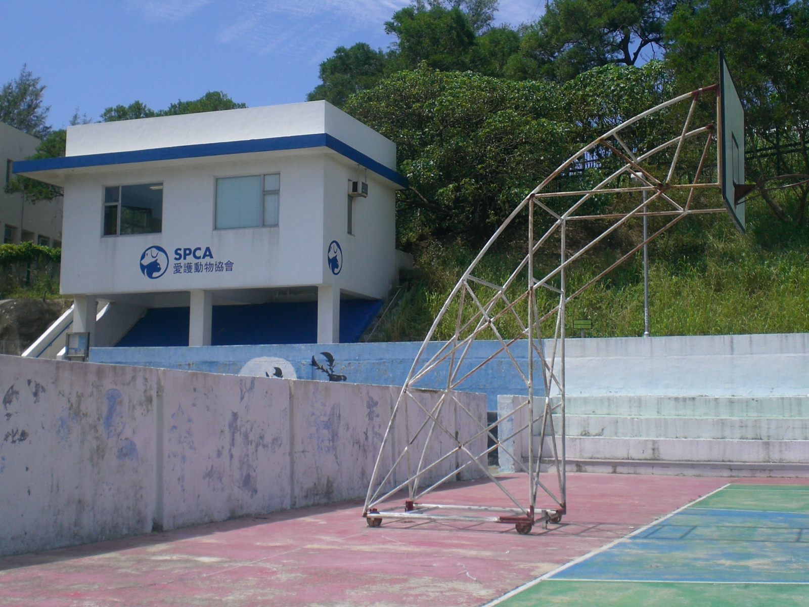 中文（香港）: 東灣海灘毗連設施及SPCA。